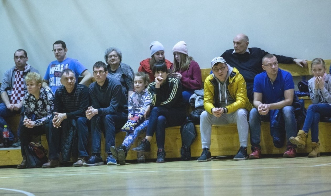 Tadeusz Gutowski - Siatkówka II liga.